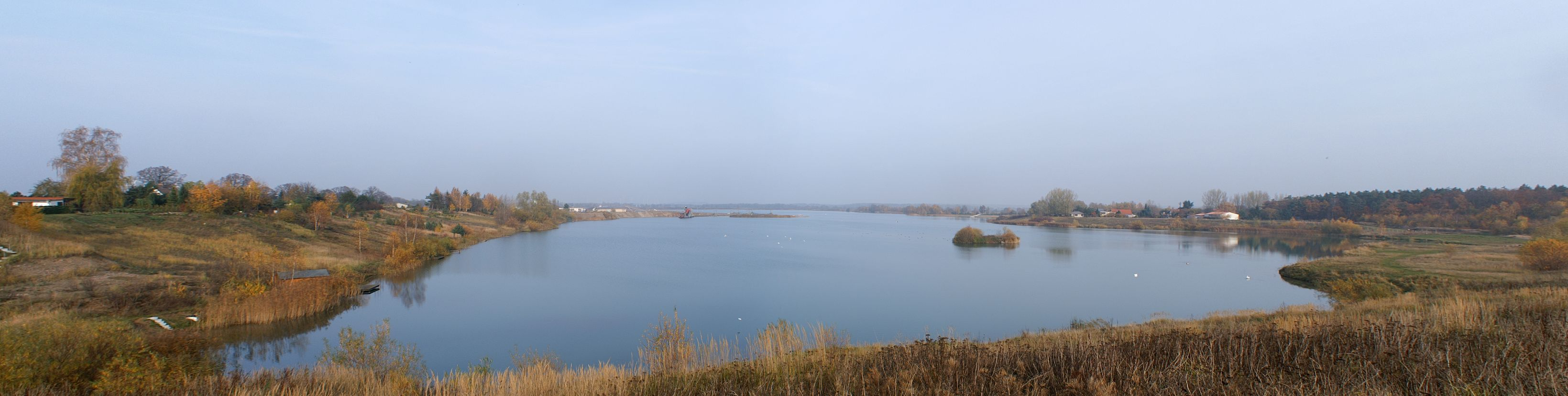 Der Kiessee bei Zarrenthin , Gemeinde Bentzin, Landkreis Demmin von Sueden